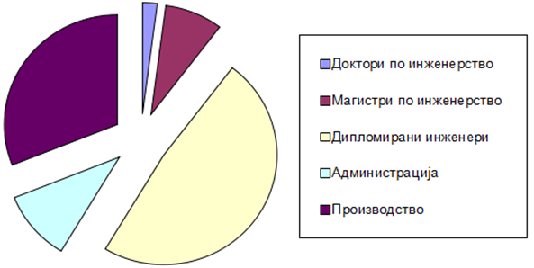 ОРГАНОГРАМ МИКРОСАМ АД